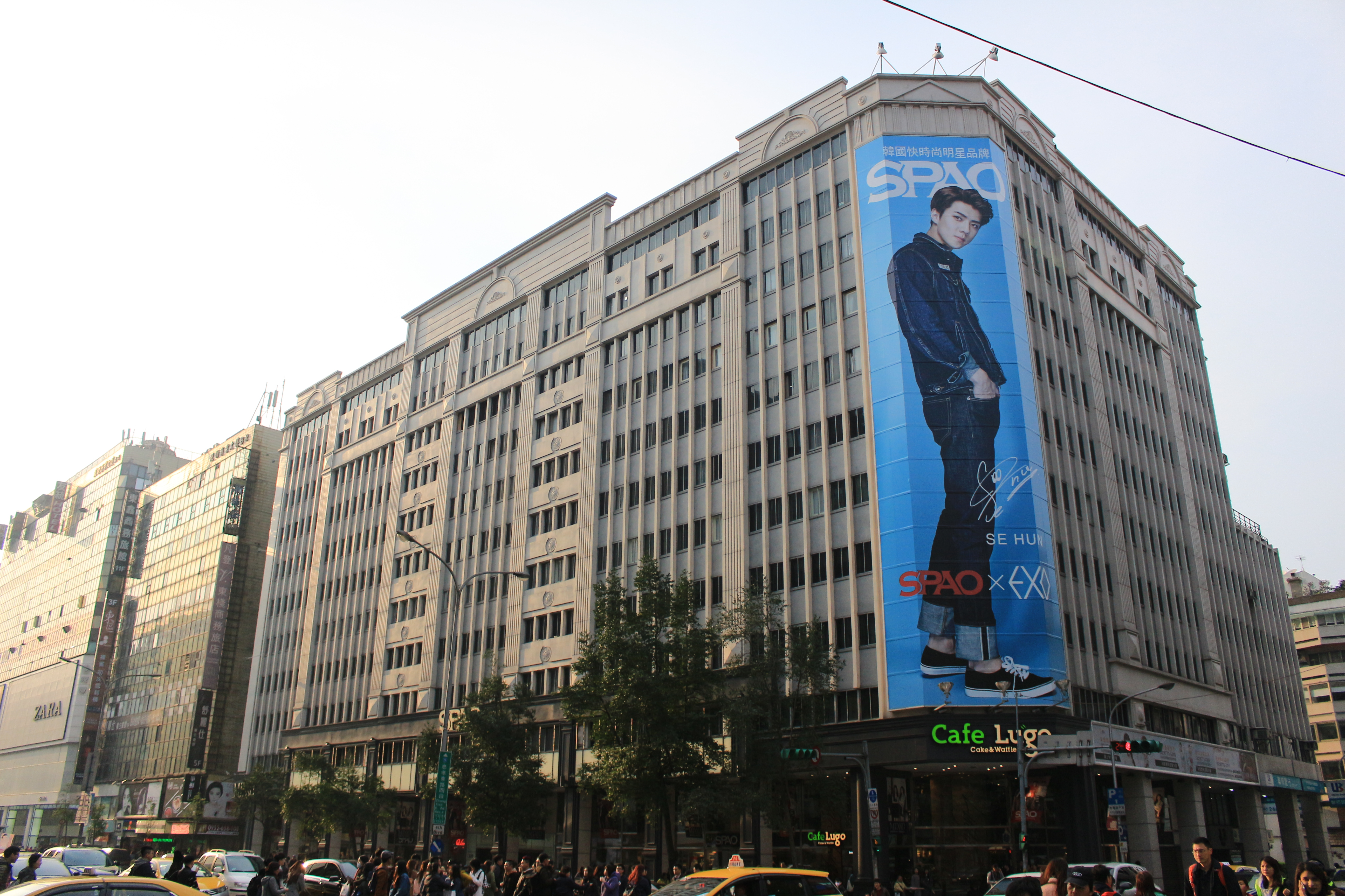 微風忠孝所在的華新大樓，位於臺北市大安區忠孝東路四段219號。